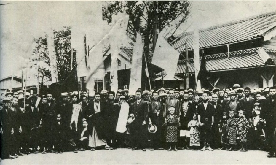 松阪駅前で全国水平社の中央委員、上田音市の入獄(懲役5ヶ月)を送る農民たち。日本近代史研究会所蔵。